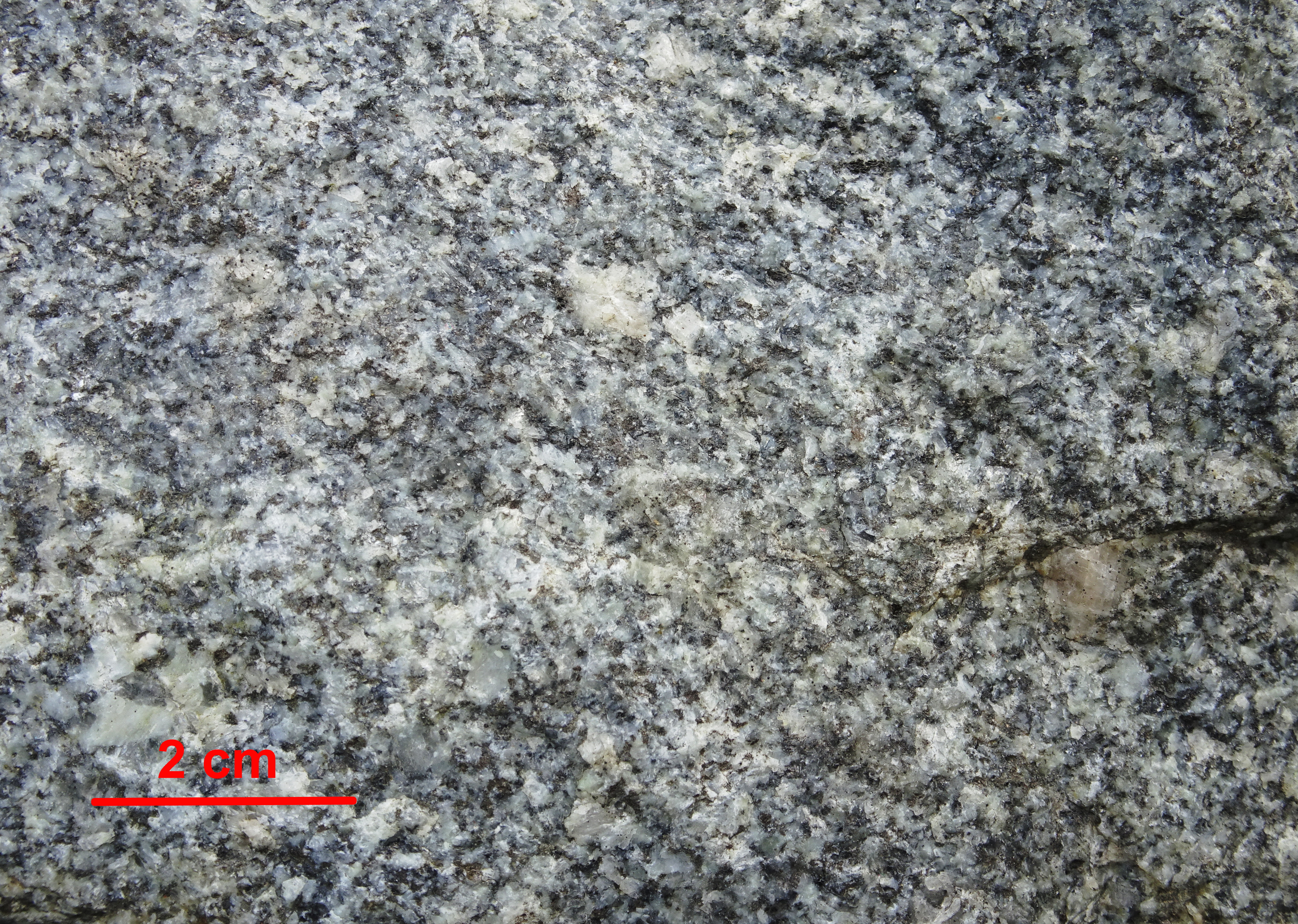 Grå-blå granit från före detta Huvudsta stenbrott